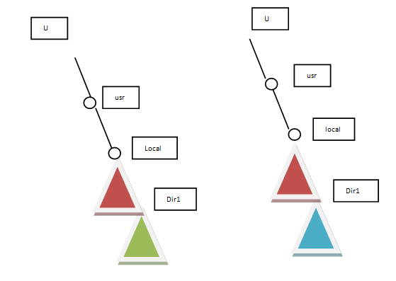 cascading mounten van besturingssystemen